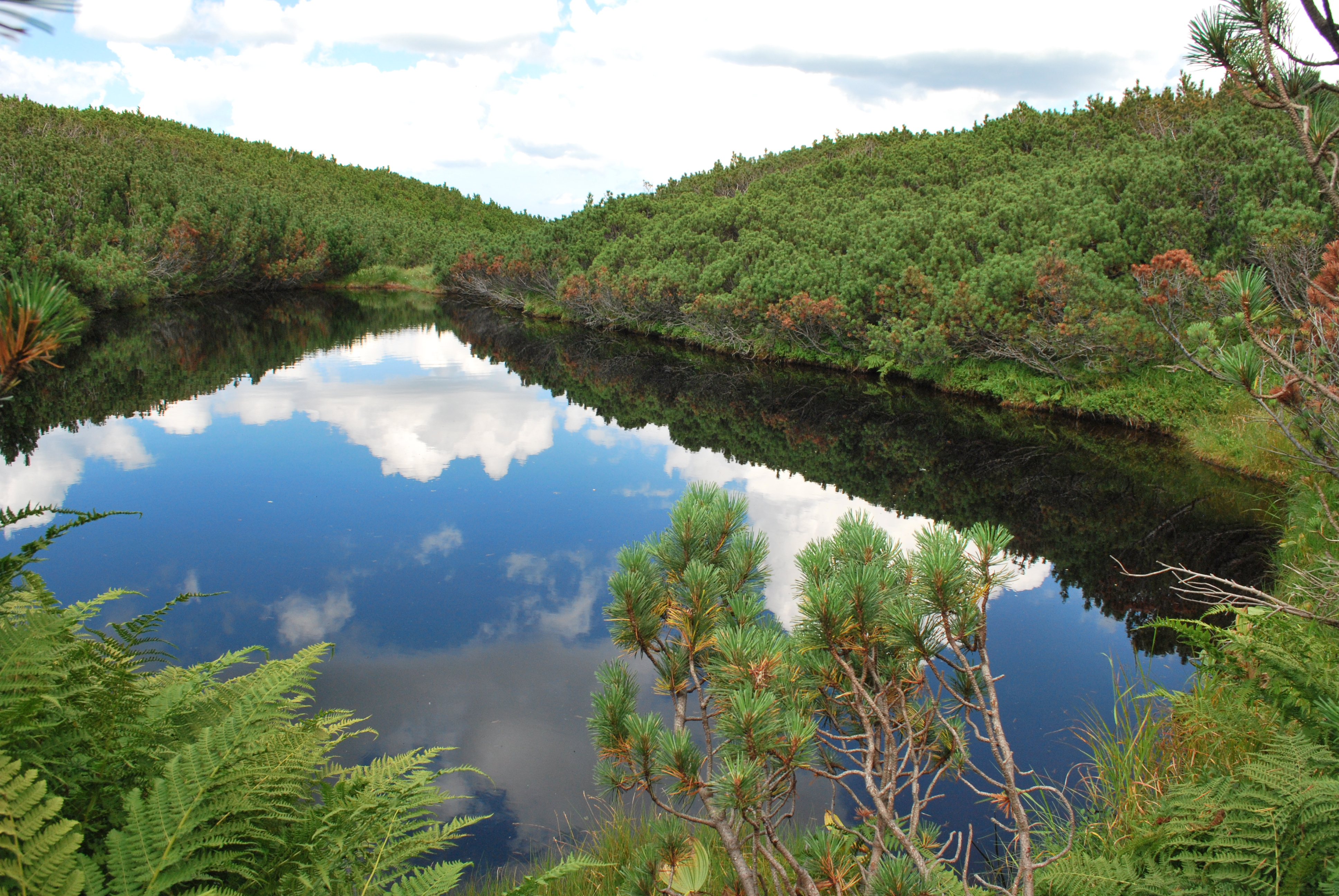 Заховане - загальний вид з півдня 2016